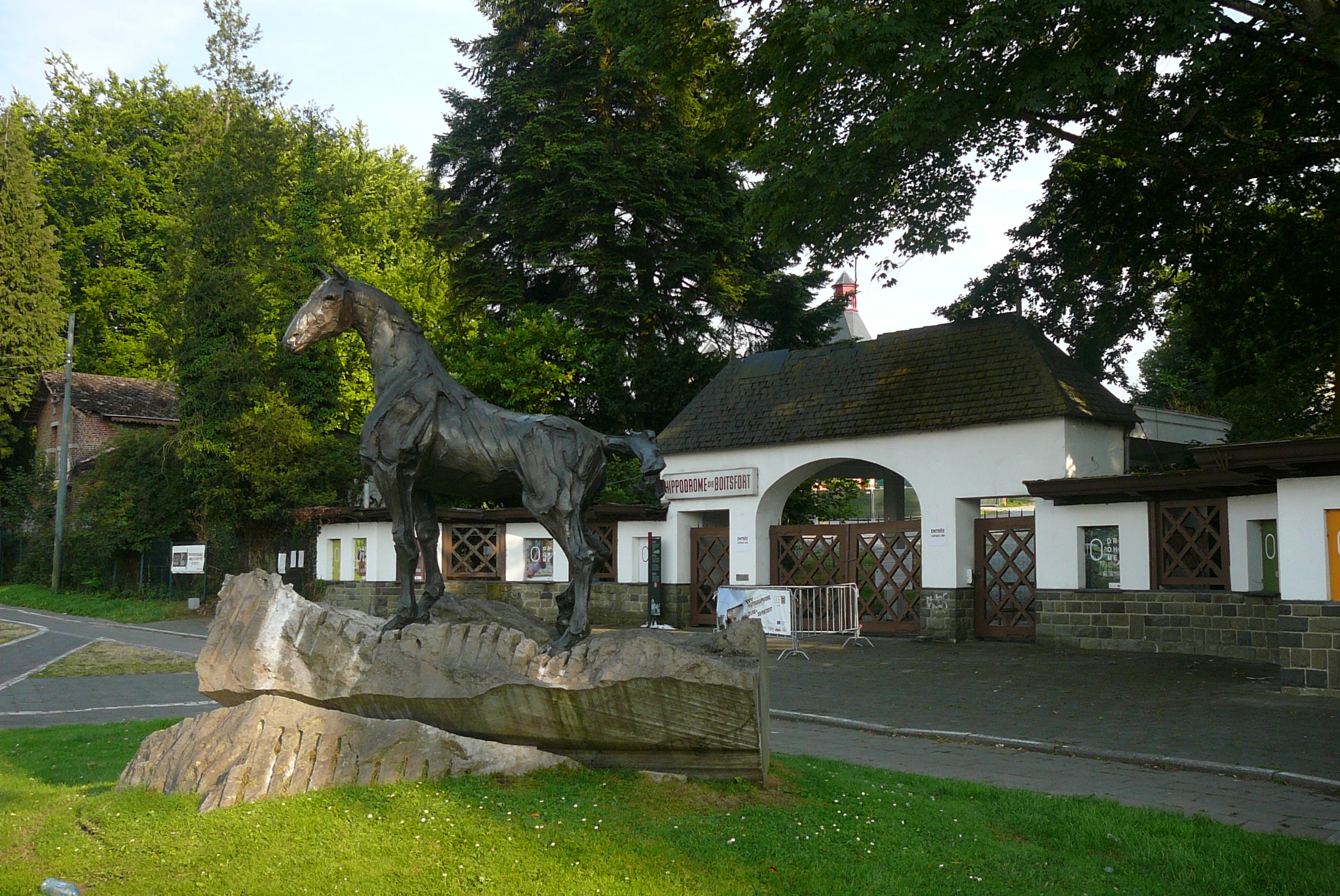 Entrée de l'Hippodrome de Boitsfort, à Bruxelles-Ville, en Région de Bruxelles-Capitale, Belgique, avec la sculpture Grégala (1994) de Lucie Sentjens